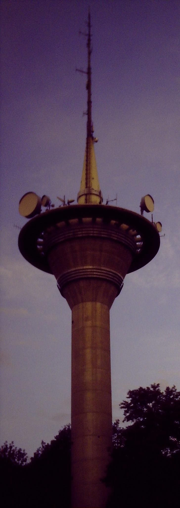 Funkturm Stuttgart.